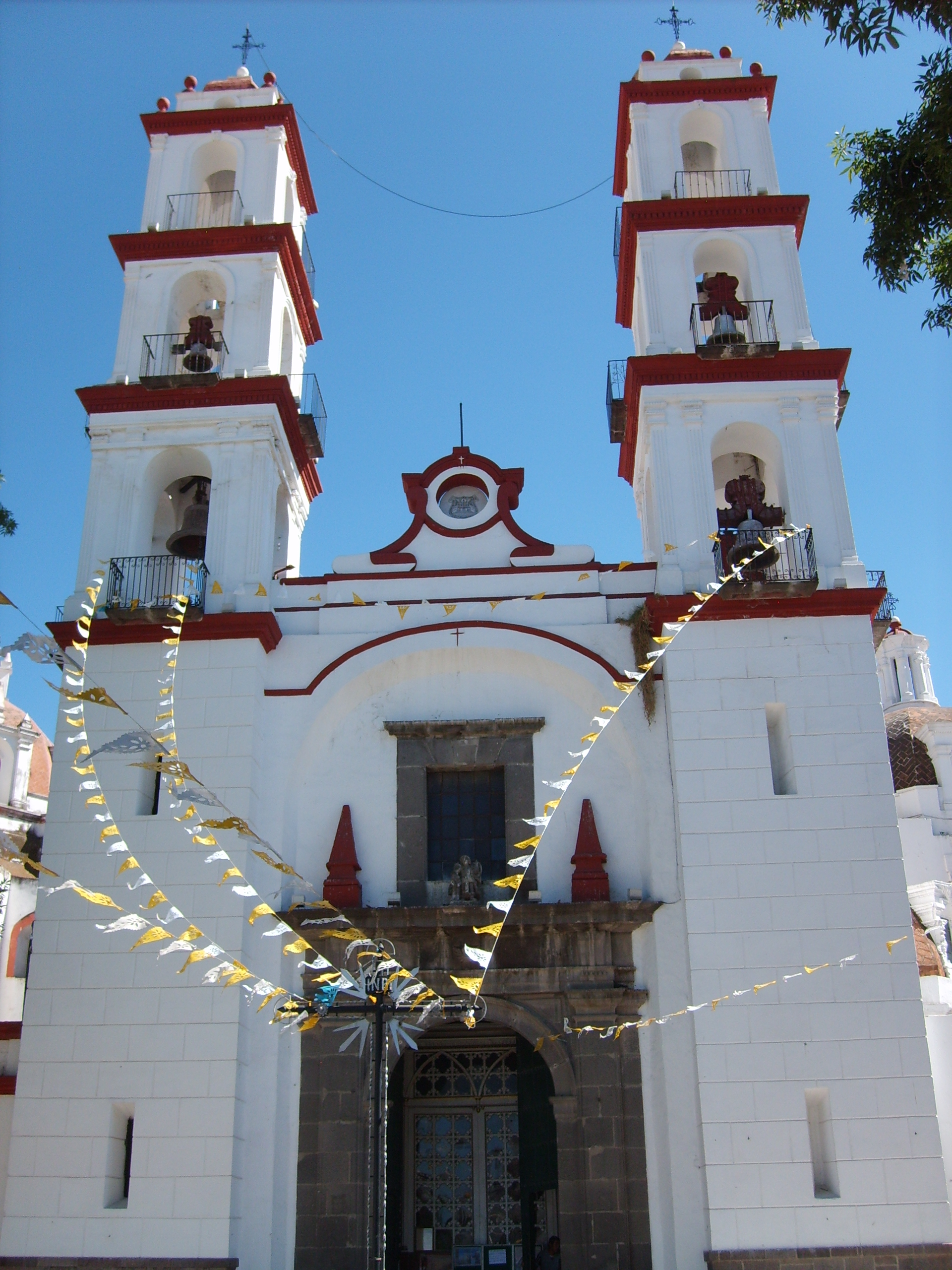 Templo del Santo Ángel Custodio de Analco, ubicado en el antiguo barrio indigena de Analco, en la ciudad de Puebla.